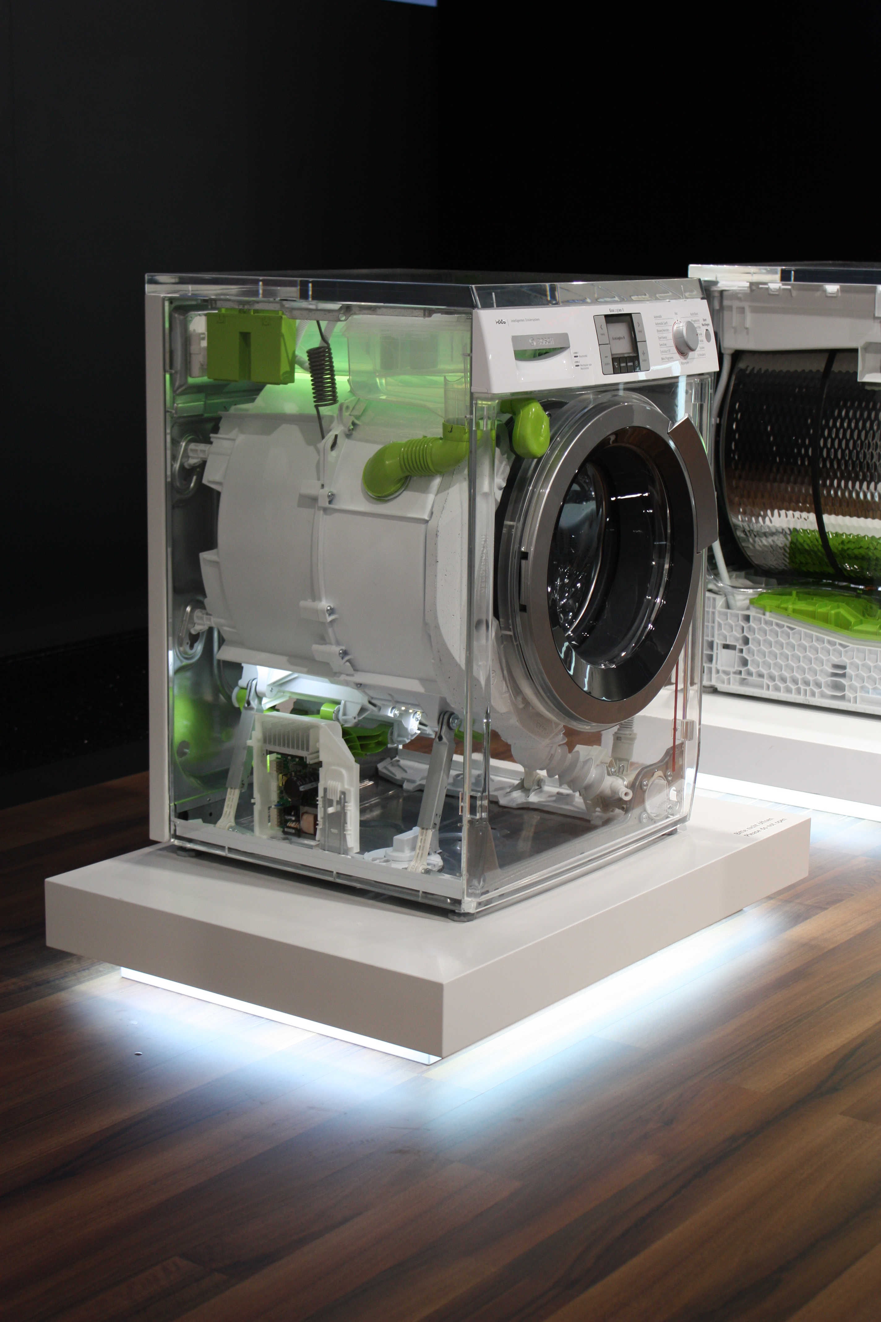 IFA 2010, Berlin Waschmaschine des Unternehmens Bosch.